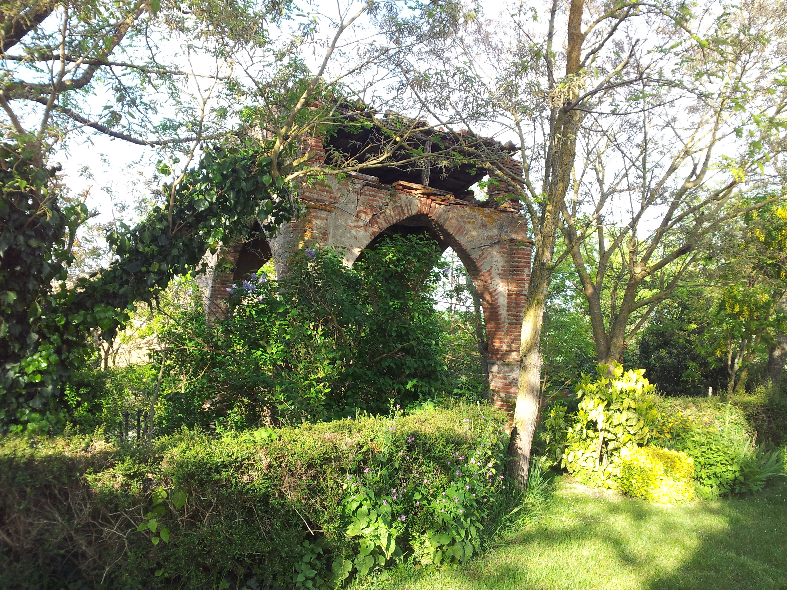 Pigeonnier de Caignac (Haute-Garonne, France).